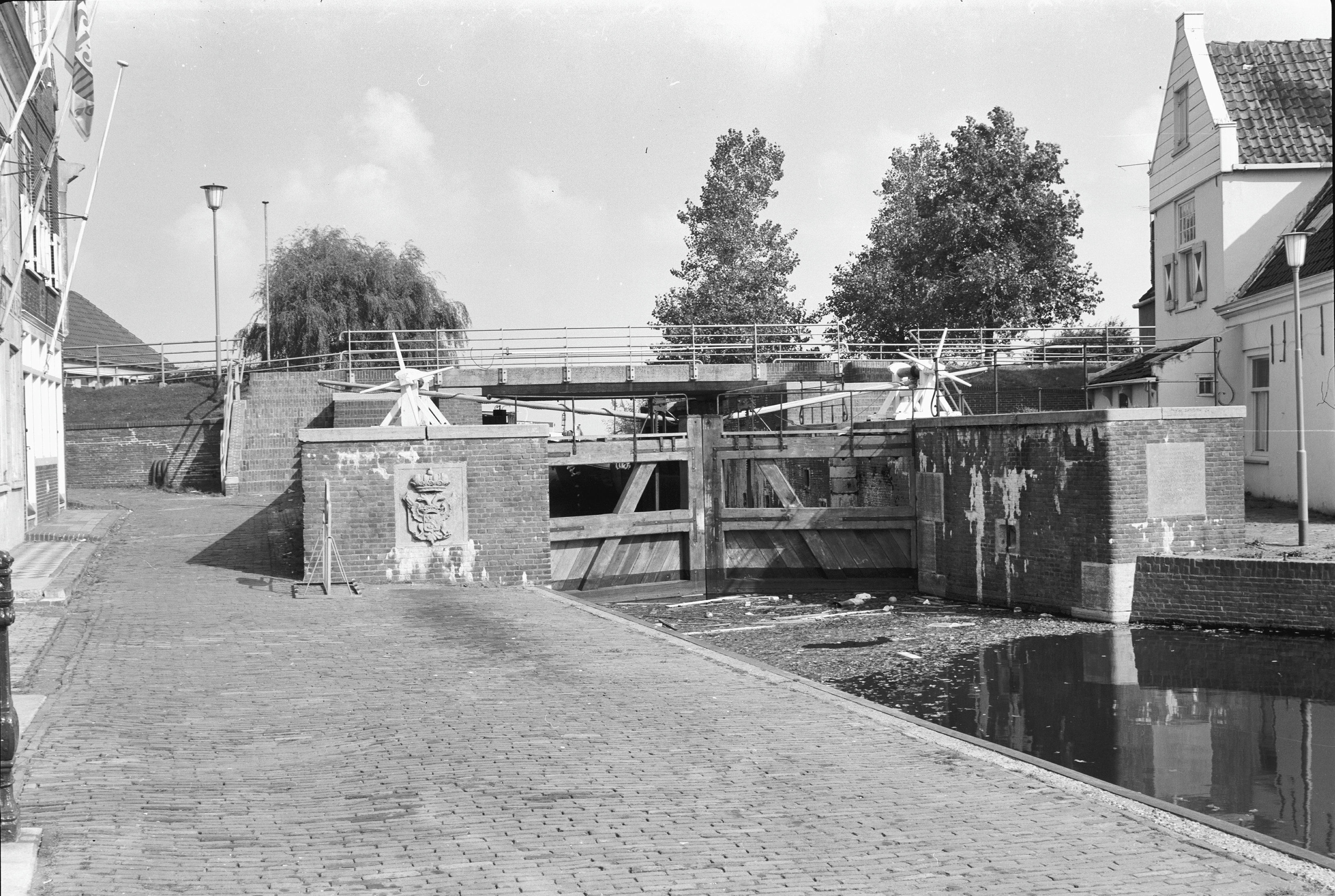 Kolksluis: overzicht